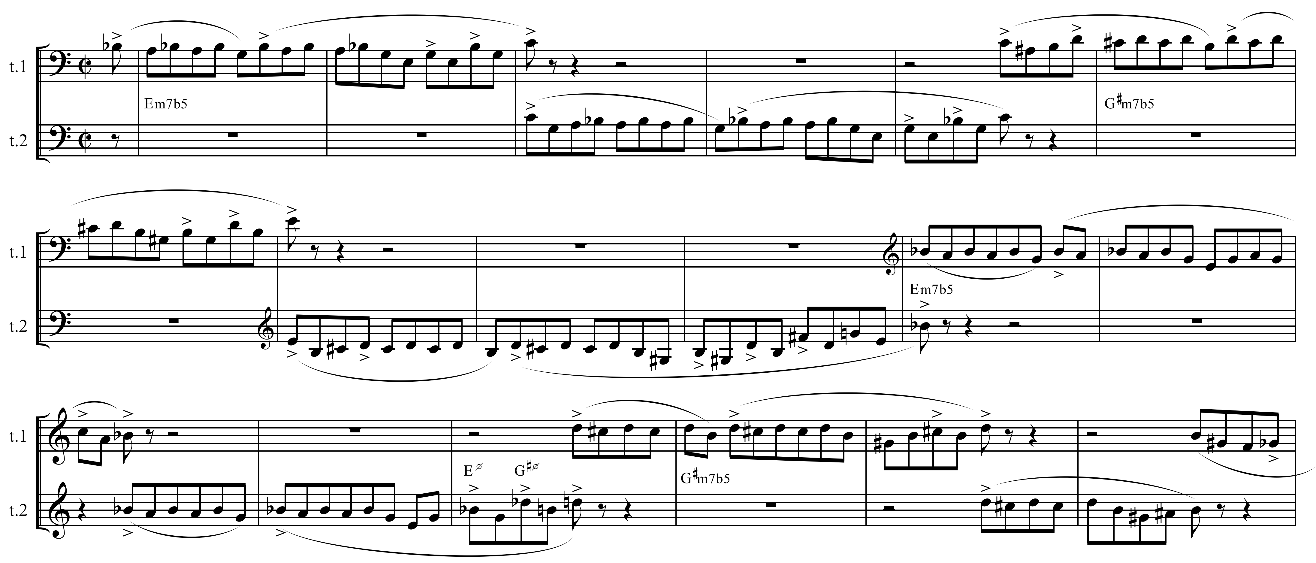 Extrait de la pièce XIV d'Anna Livia Plurabelle d'André Hodeir